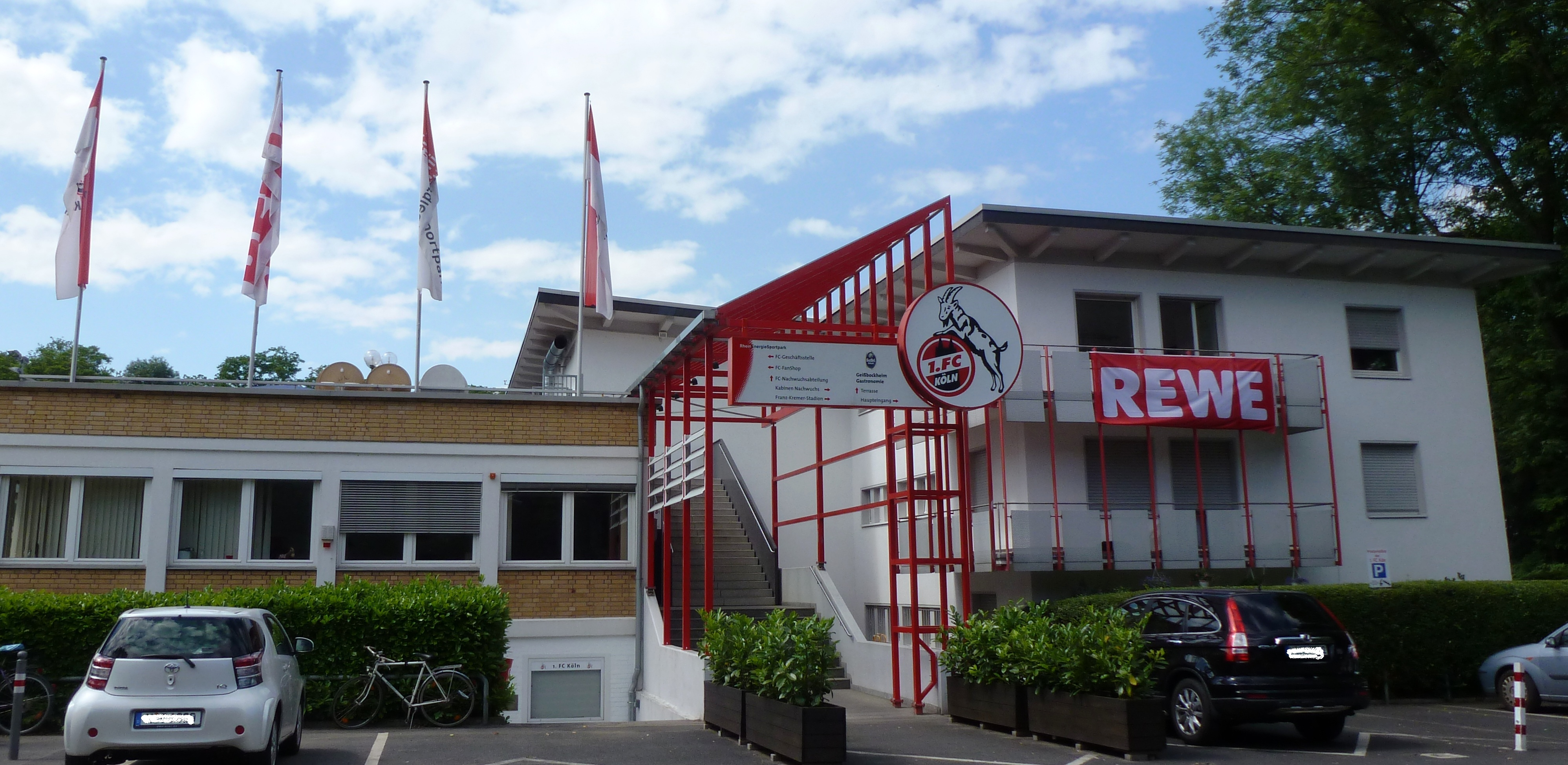 Ansicht des Geißbockheims, Juni 2012